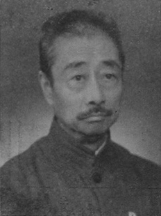 中文（台灣）: 中國人民政治協商會議第一屆全體會議代表